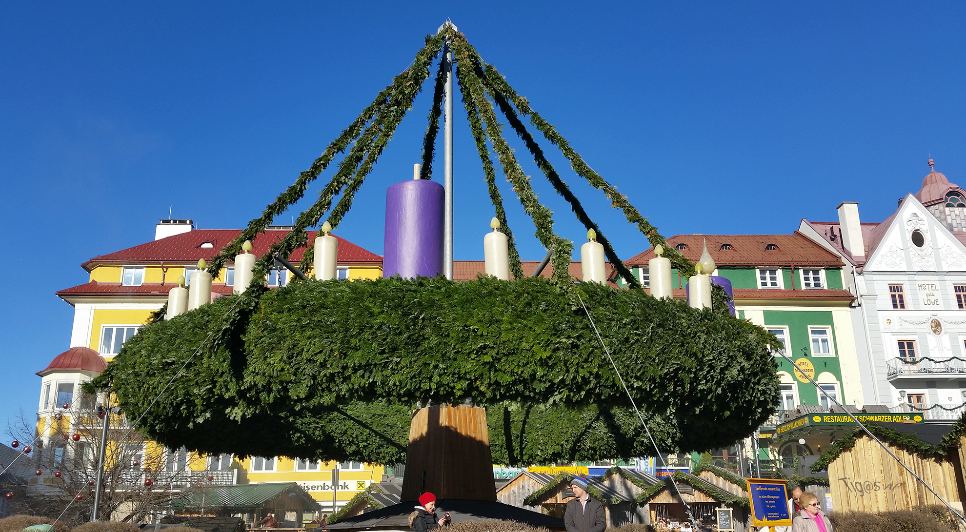 Foto-Adventkranz-Mariazell-von-Peter-Asinger